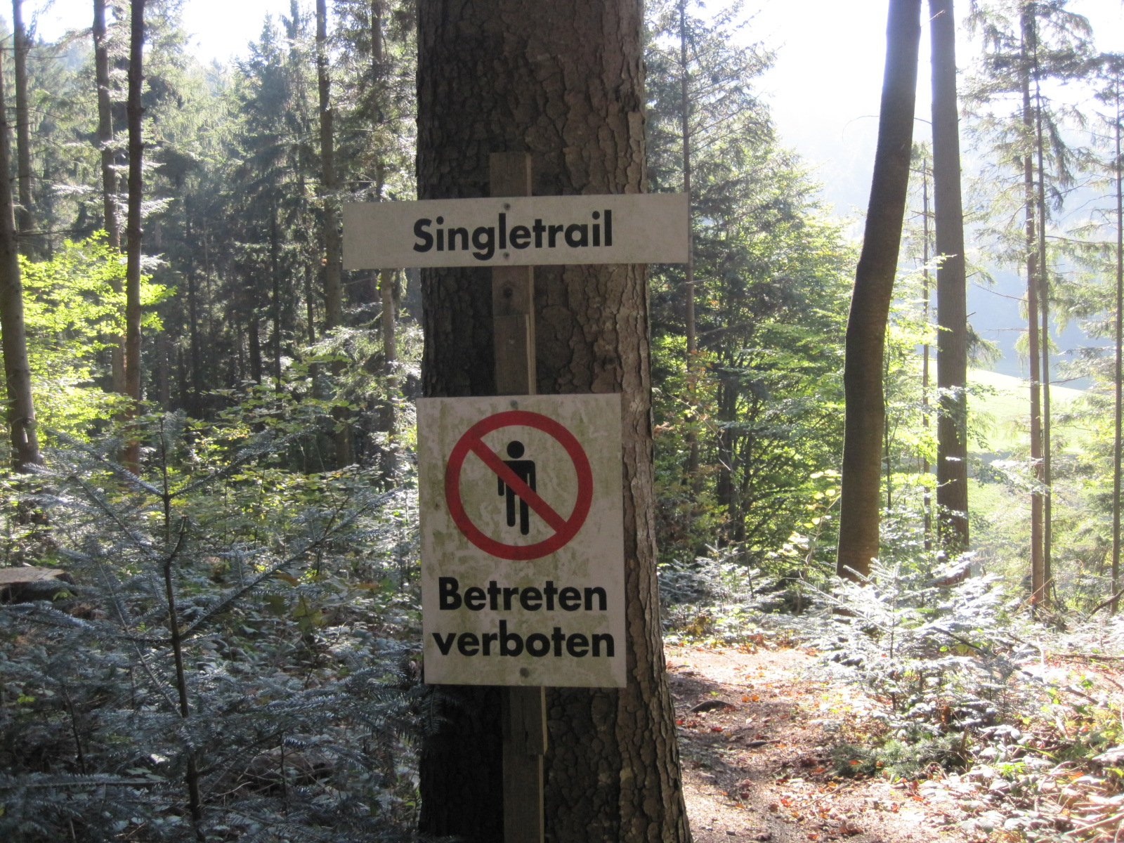 Singletrail am Giersberg